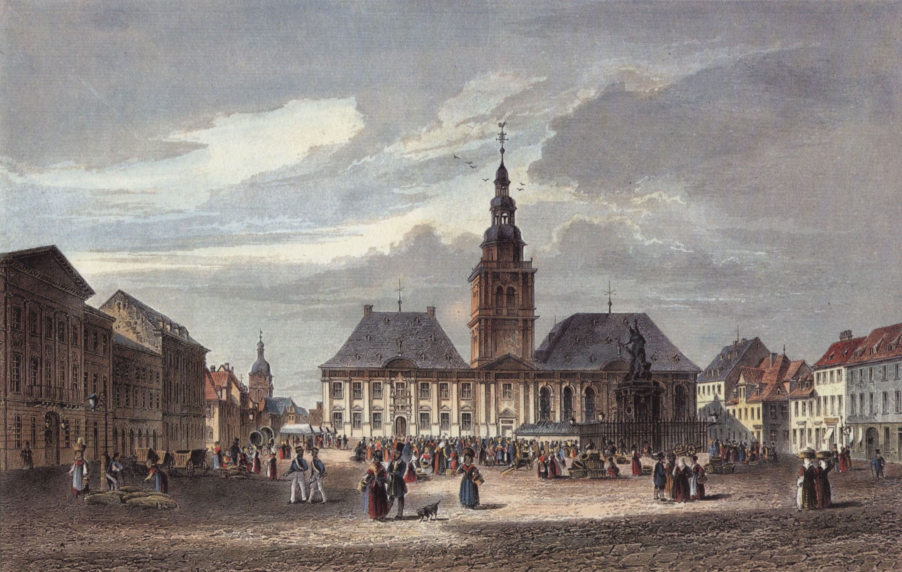 Joseph Maximilian Kolb: Mannheim, Marktplatz mit Rathaus und Sebastianskirche. Stahlstich, koloriert. Nach einer Zeichnung von Giacomo Pozzi